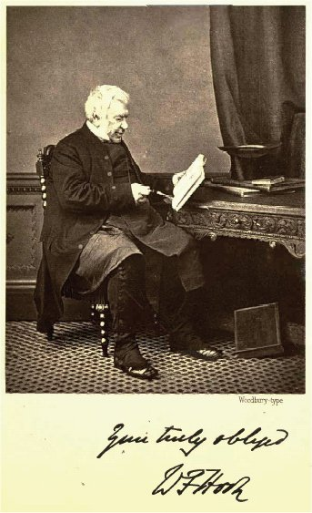 Walter Farquhar Hook